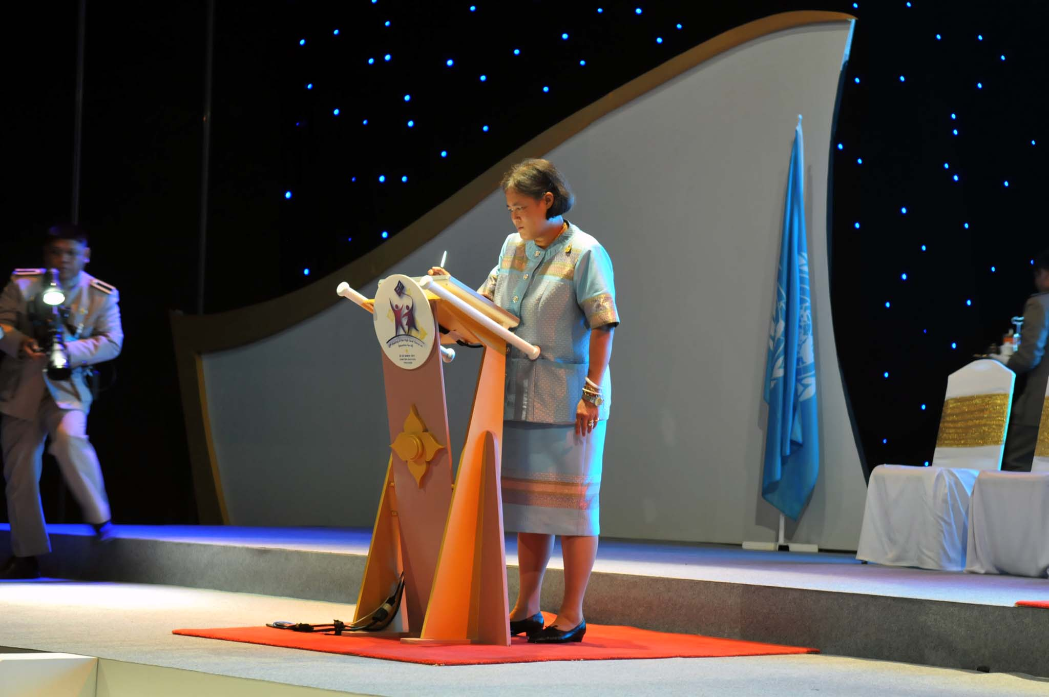 นายกรัฐมนตรี กราบบังคลทูลรายงาน สมเด็จพระเทพรัตนราชสุดาฯ สยามบรมราชกุมารีเสด็จเป็นองค์ประธานในพิธีเปิดการประชุมระดับสูงว่าด้วยการศึกษาเพื่อปวงชน ครั้งที่ 10 จัดโดยกระทรวงศึกษาธิการ โรงแรมรอยัล คลิฟ บีช รีสอร์ท จังหวัดชลบุรี (ภาพโดยสำนักโฆษก)